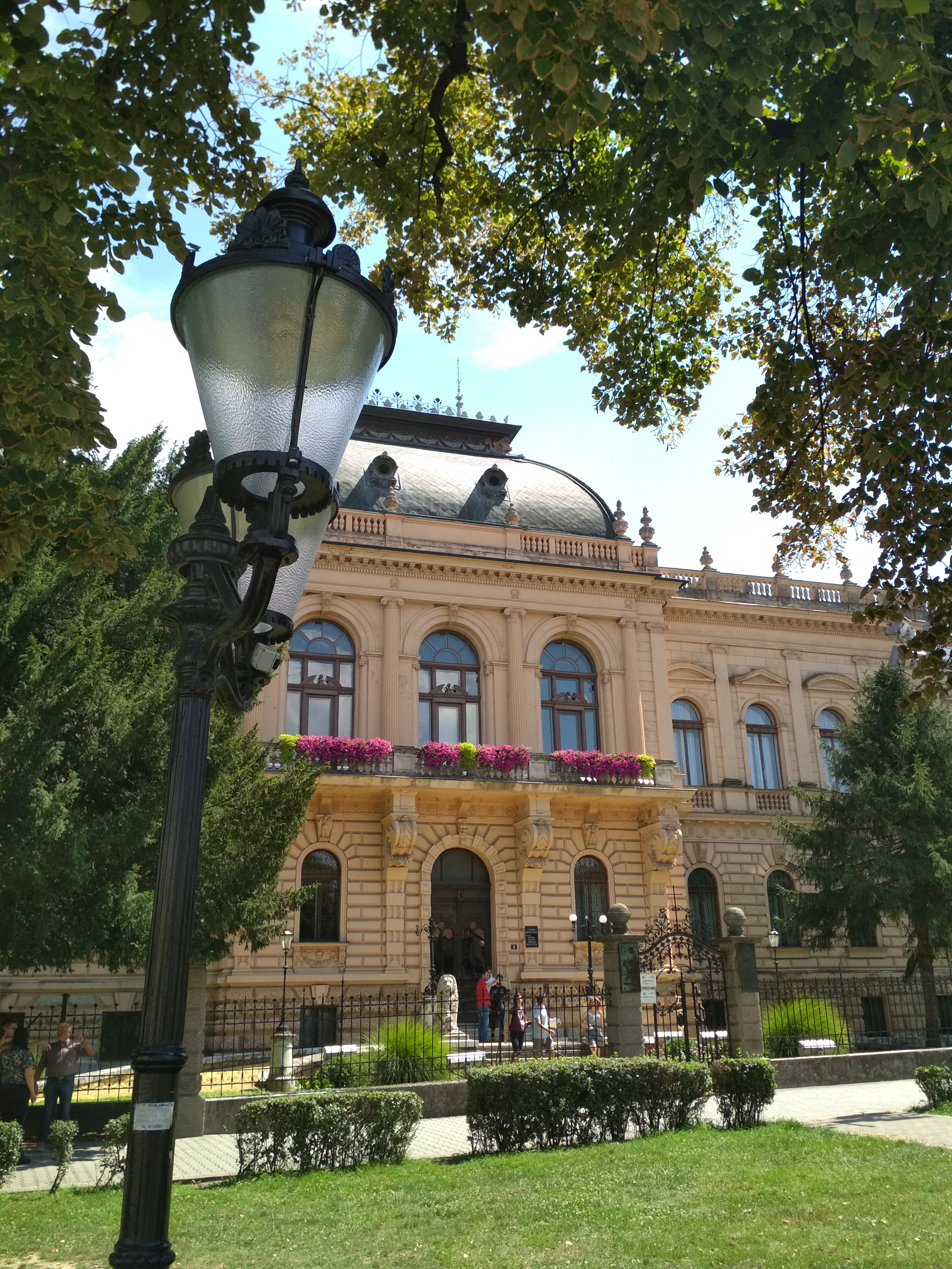 Српски (ћирилица): Здање је подигнуто за потребе интерната за ђаке карловачке Богословије 1901-1903. године под покровитељством патријарха Георгија Бранковића. Аутор пројекта био је архитекта Владимир Николић.